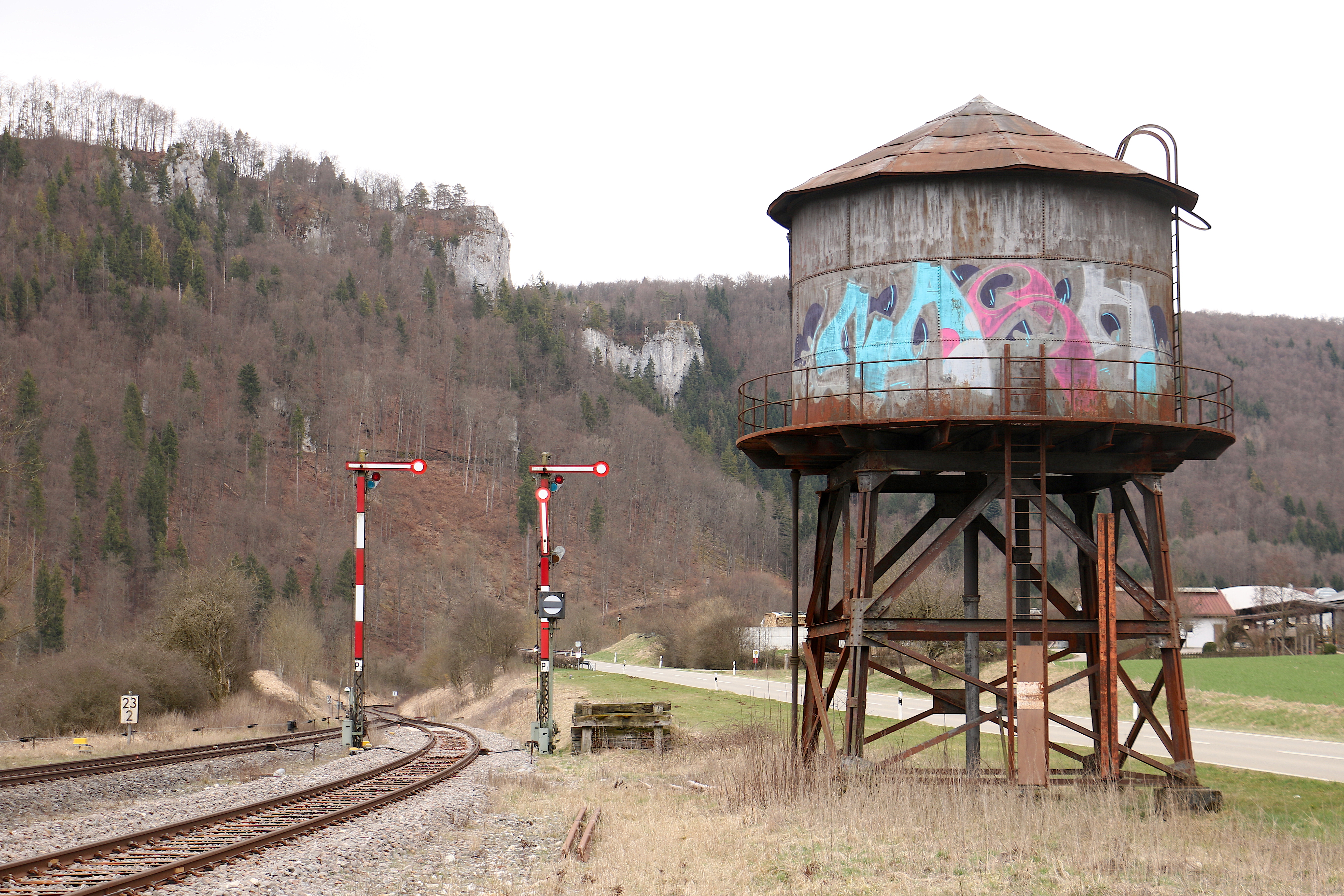 Wassertank und Ausfahrsignale in Hausen im Tal (2018)